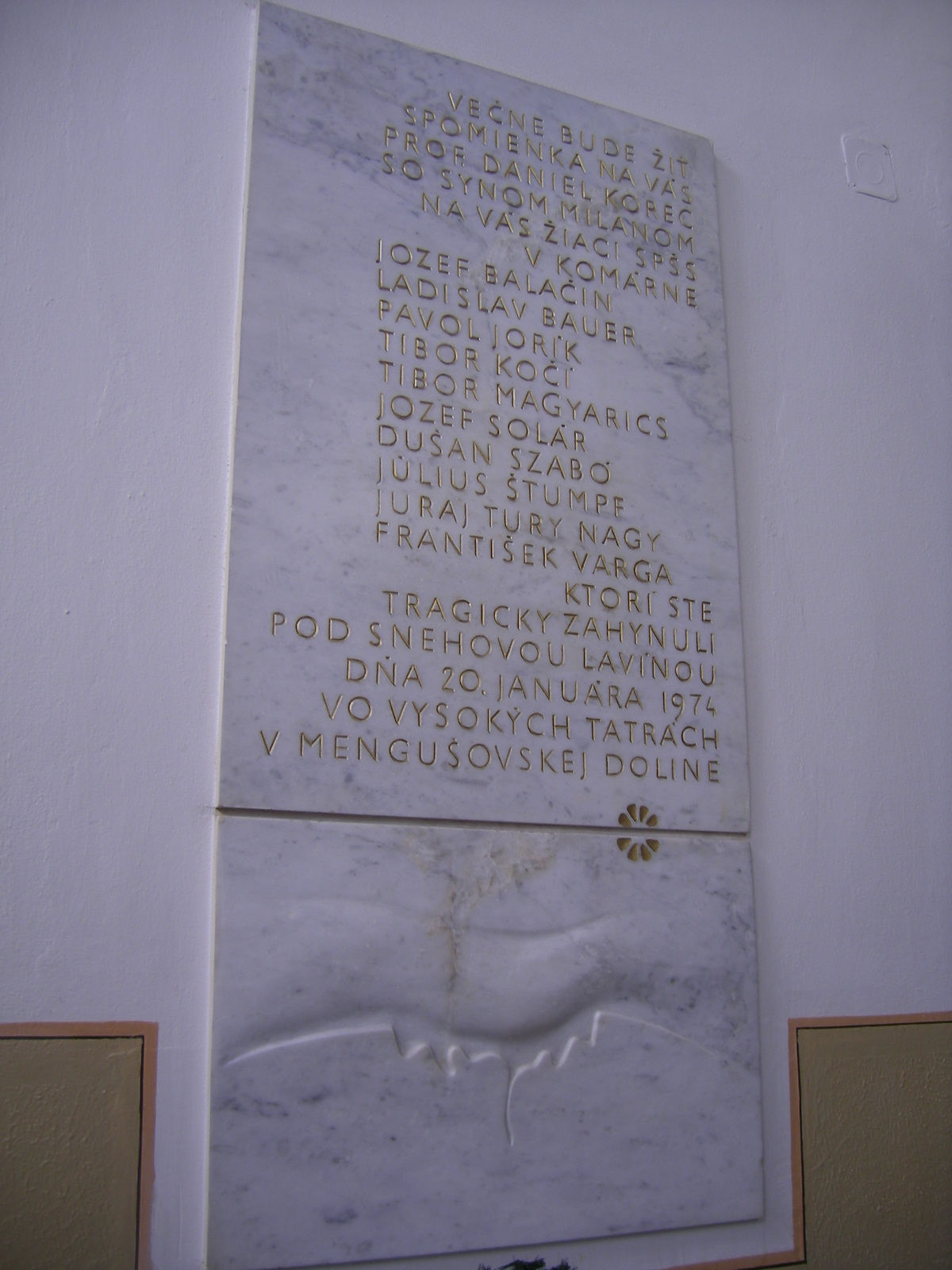 Komárom - a Tátrában lavinaszerencsétlenségben meghalt diákok emléktáblája az Ipari Középiskolában